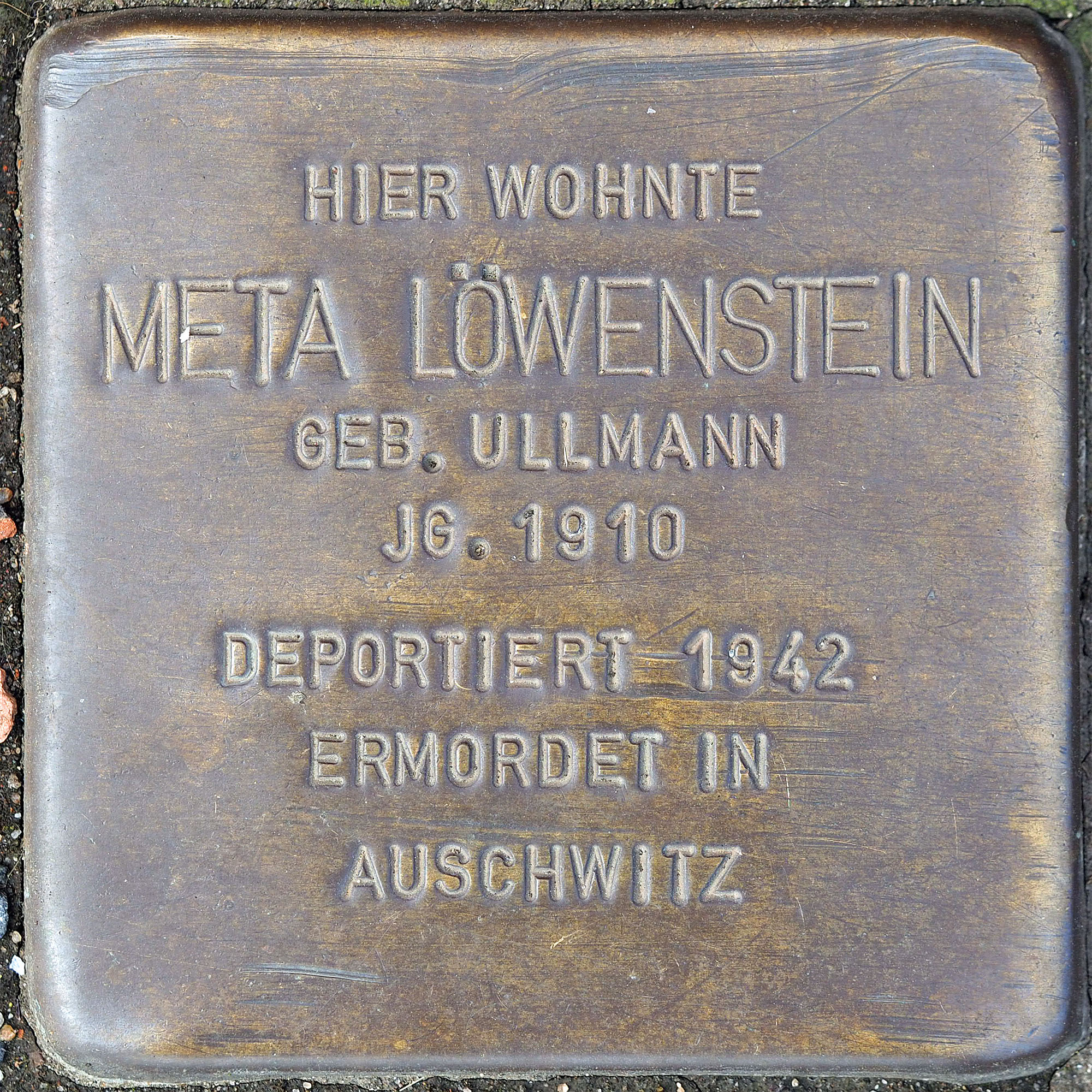 Stolpersteine Korschenbroich: Löwenstein, Meta